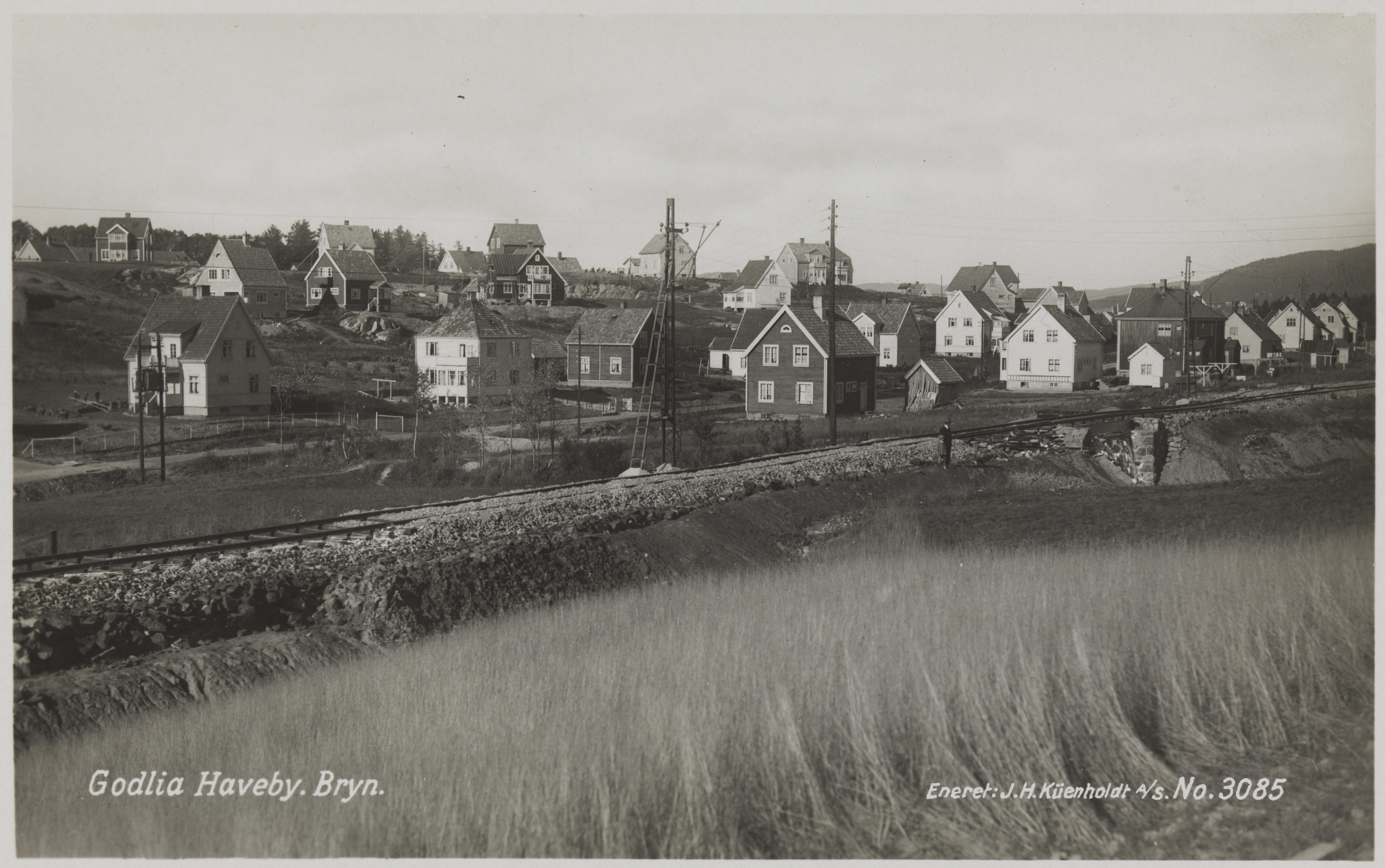 Bildet er hentet fra Nasjonalbibliotekets bildesamling Godlia,Østensjø, Oslo, Oslo